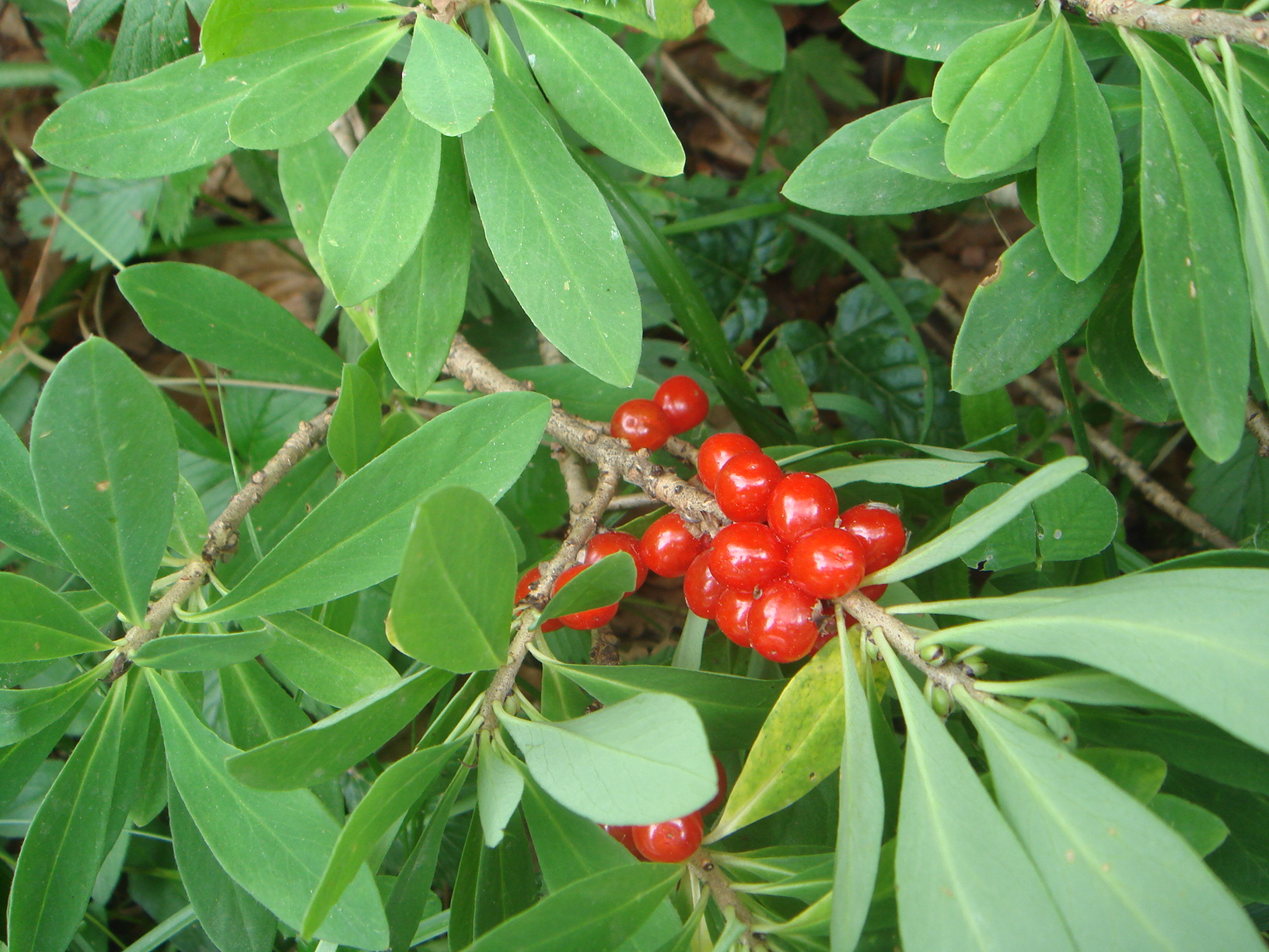 Daphne mezereum Valle de Ordesa, (Huesca), España.